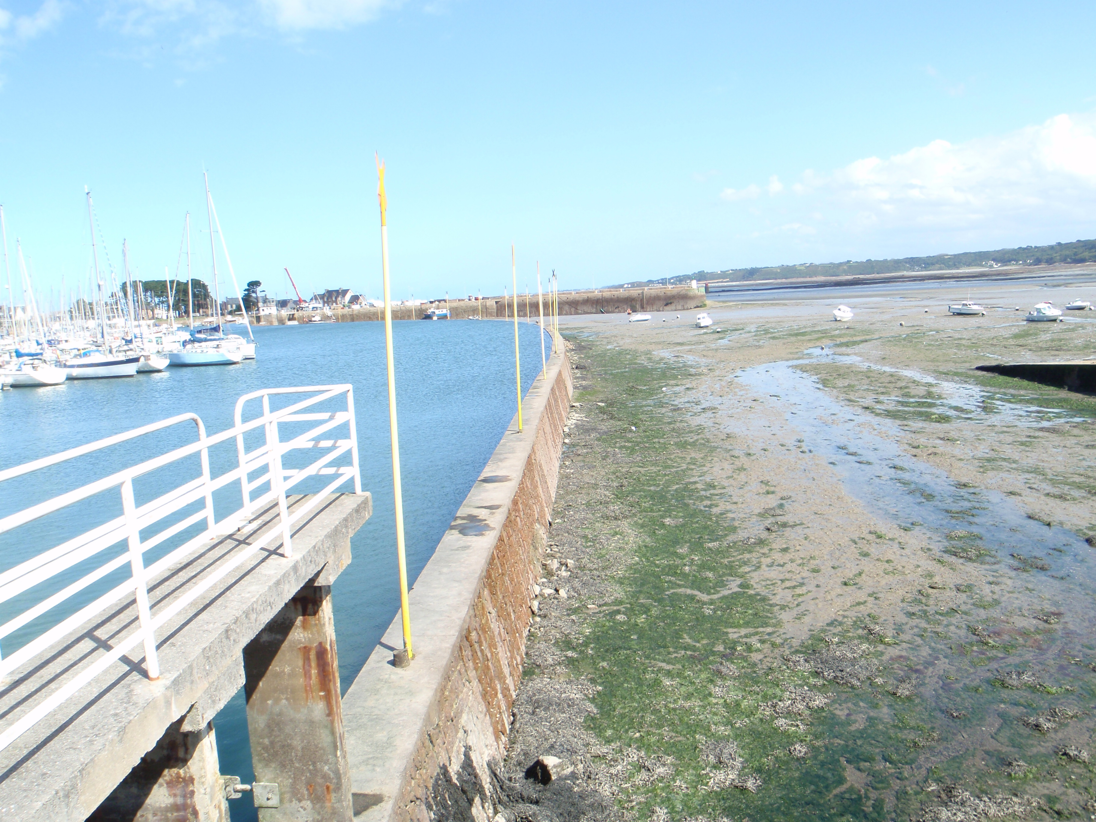 Port de plaisance de Perros-Guirec (22).